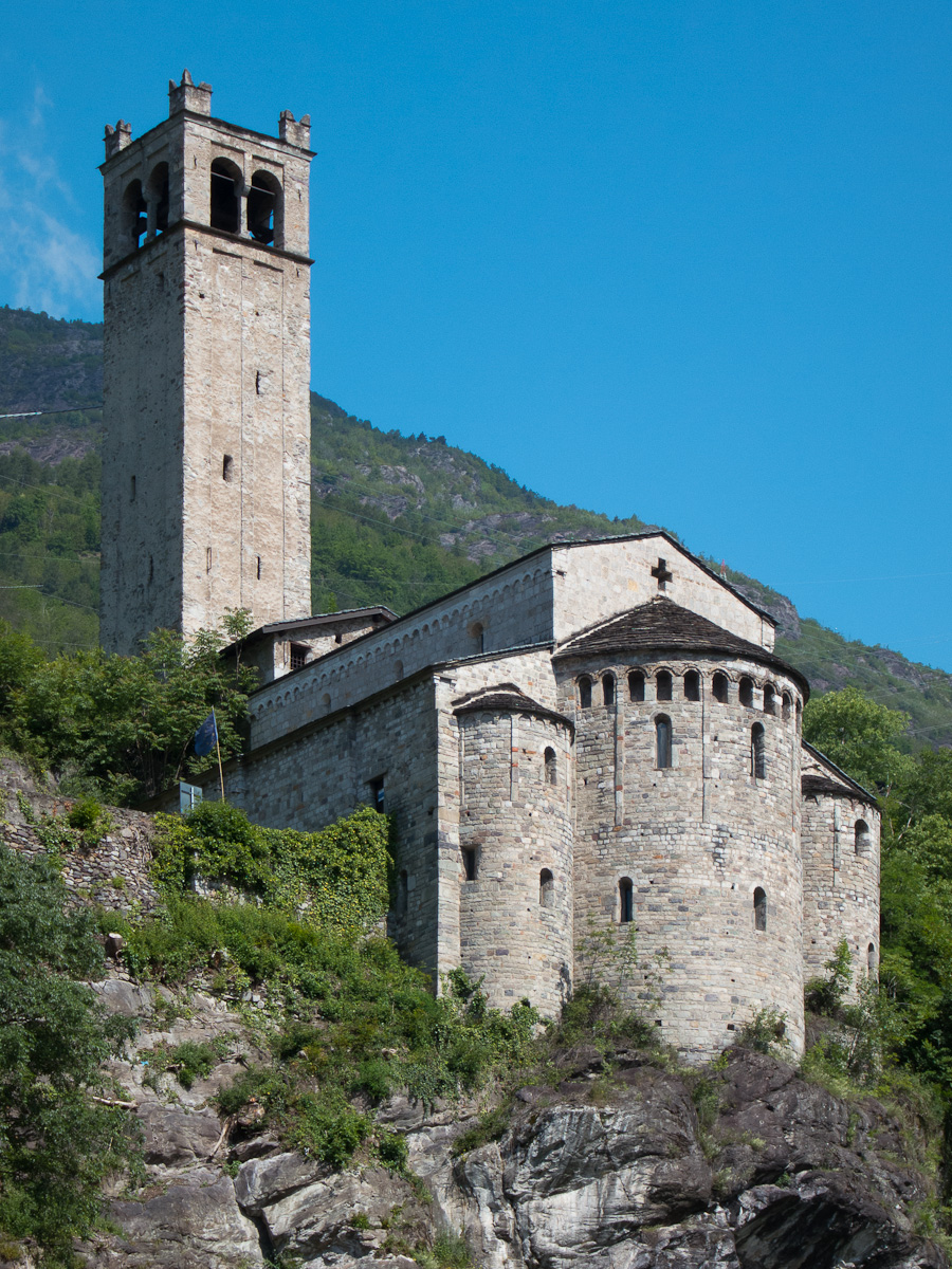 Die Pieve di San Siro in Cemmo bei Capo di Ponte im Valcamonica (Italien)